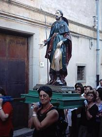 Canna, provincia di Cosenza: il simulacro di San Rocco portato in processione.